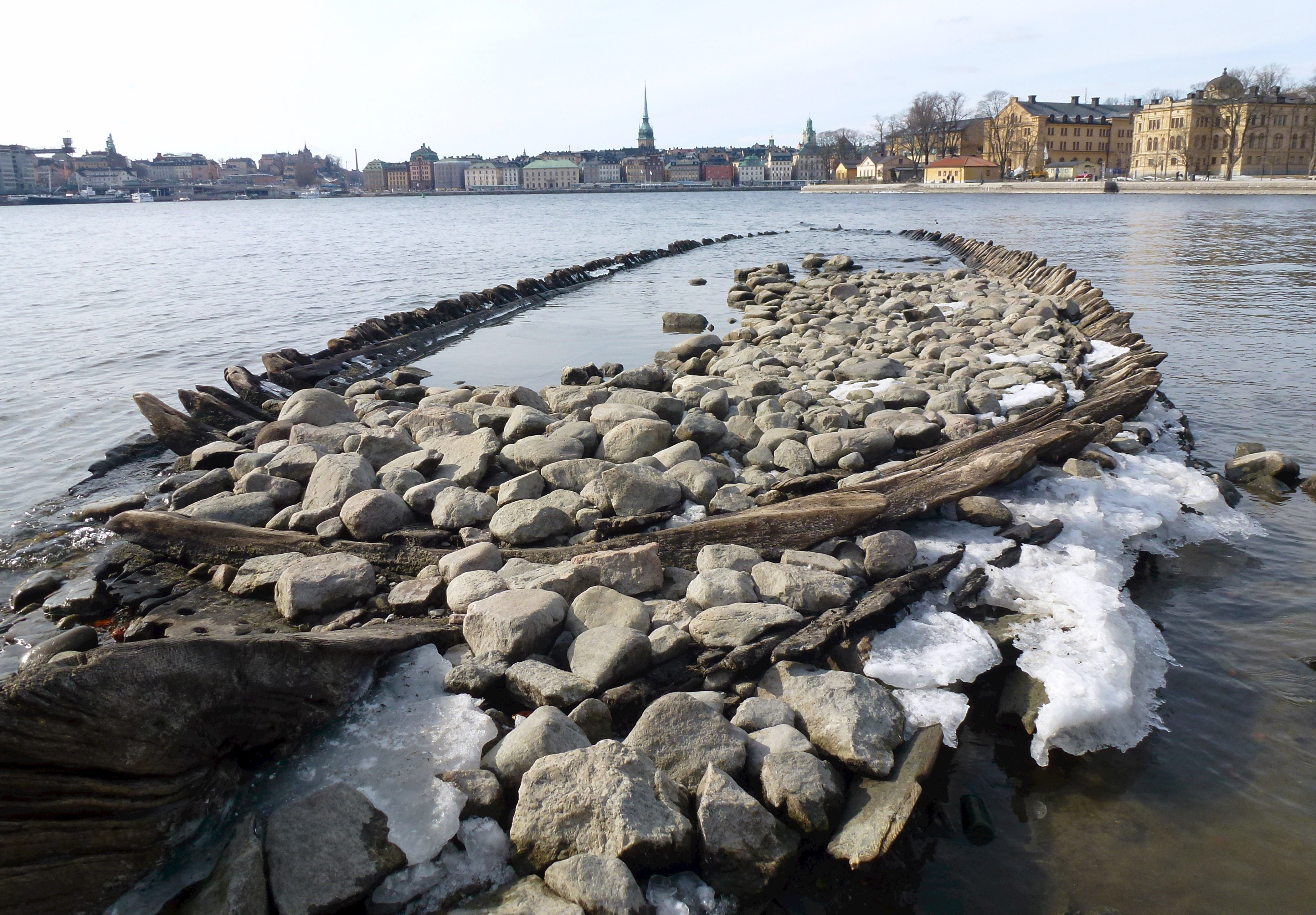 Kastellholmen vrak efter örlogsfartyg från 1600-talet